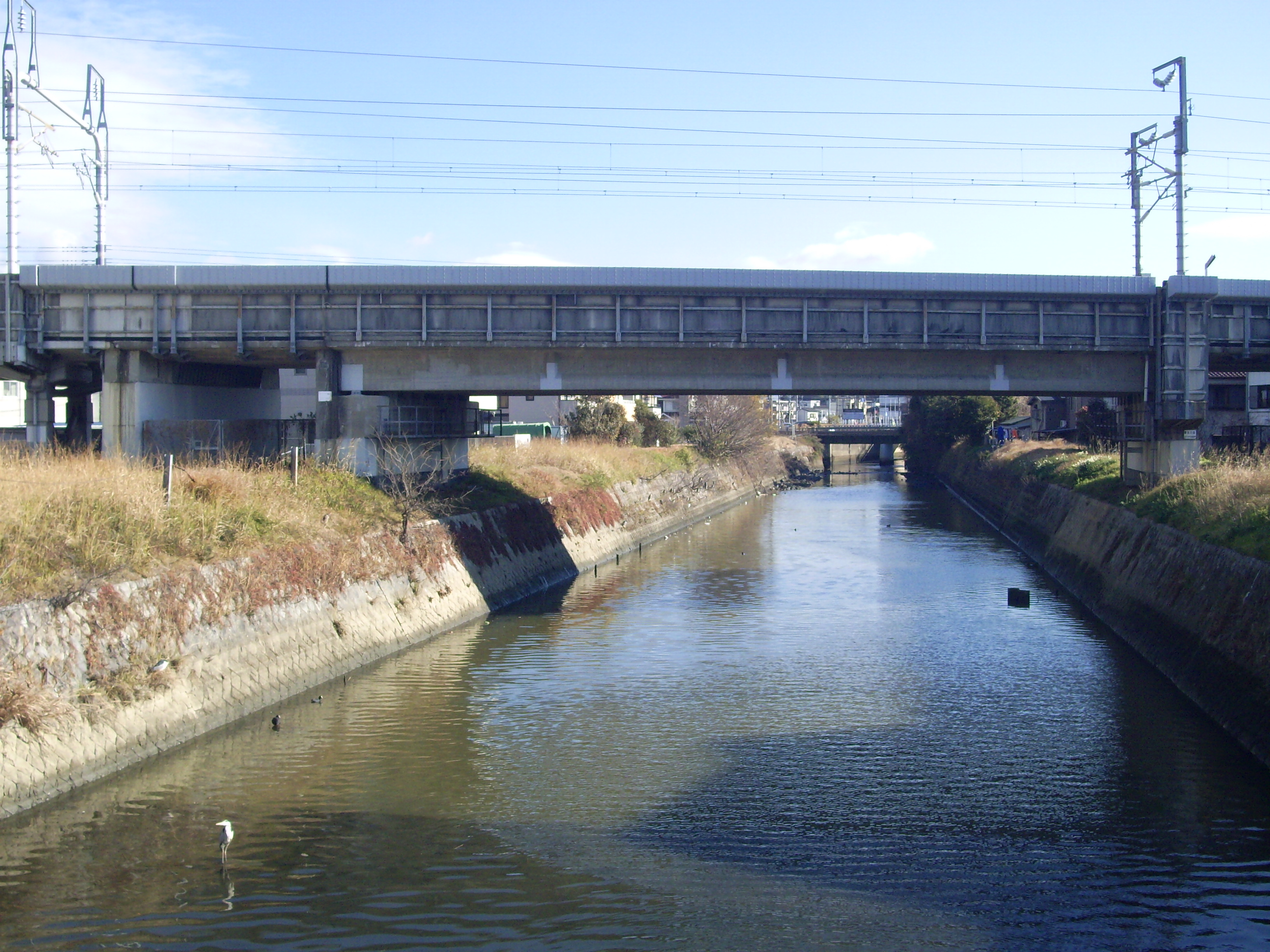 東海道新幹線柳生川橋梁（豊橋市） ㊟カメラを起動すると日付機能が出荷時のものに初期化されるため、ファイル履歴の投稿日時とメタデータの原画像データの生成日時が異なります（本概要欄の下記日付が撮影日）